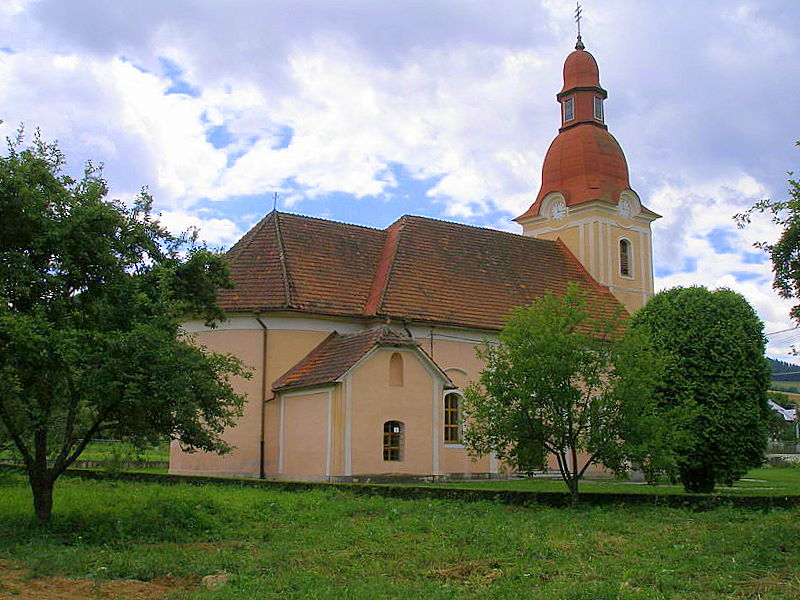 Bajerov obec v Šarišskej vrchovine, okr.Prešov, región Šariš. Rímskokatolícky Kostol svätého Michala archanjela